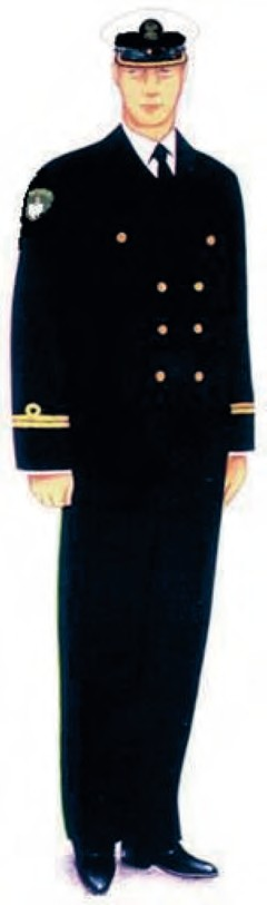 Ubiór wyjściowy funkcjonariuszy noszących umundurowanie MW z mundurem wyjściowym i z czapką garnizonową.